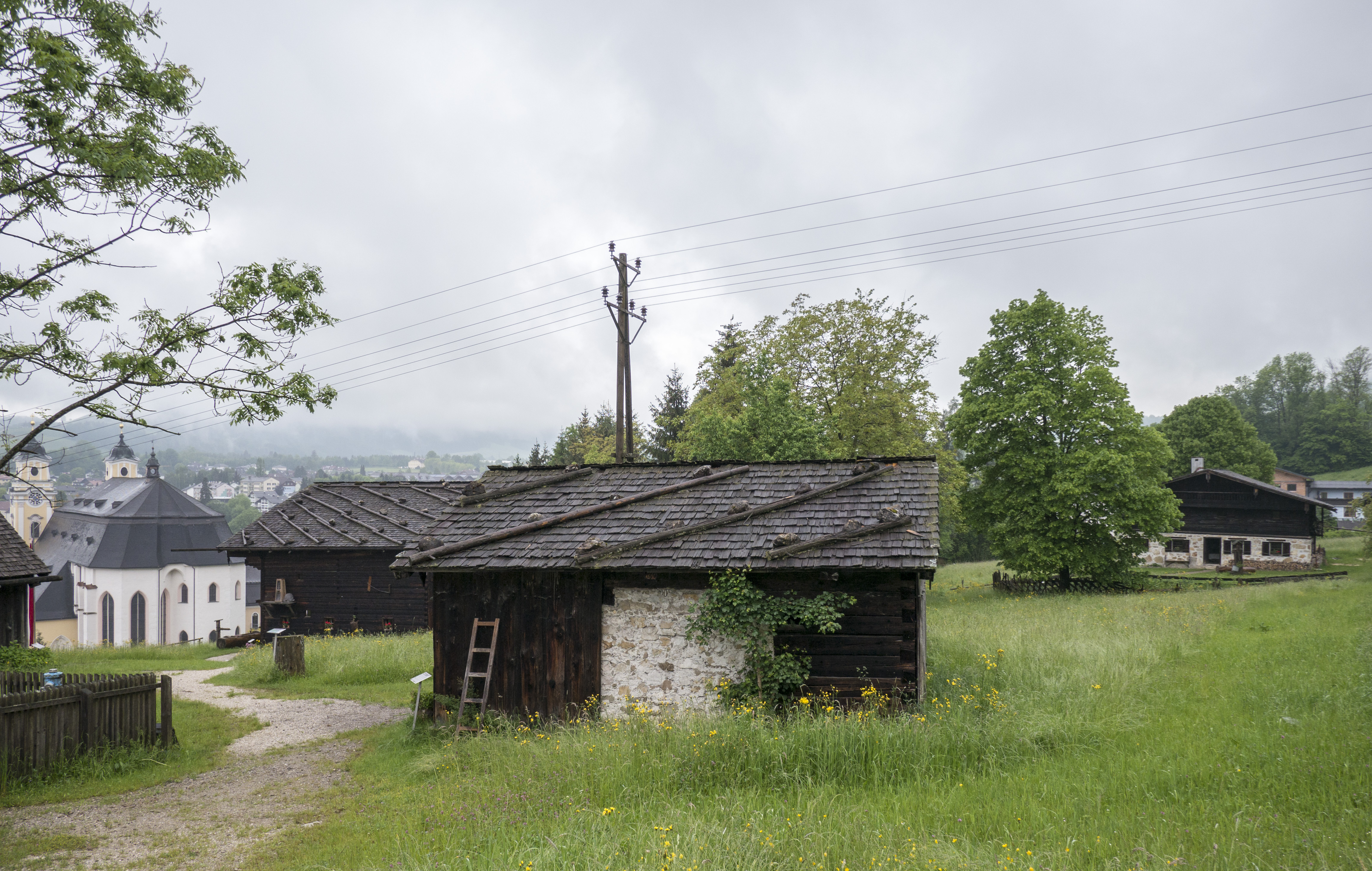 Freilichtmuseum Mondseer Rauchhaus, Bischofergut